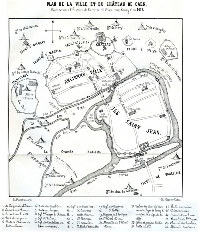 plan de la ville et du château de Caen pour servir à l'histoire de la prise de Caen par Henry V en 1417